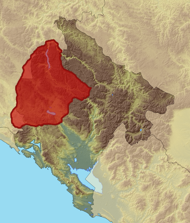 Označeno područje predstavlja prostor koji je u kasnom srednjem vijeku bio naseljen Matarugama